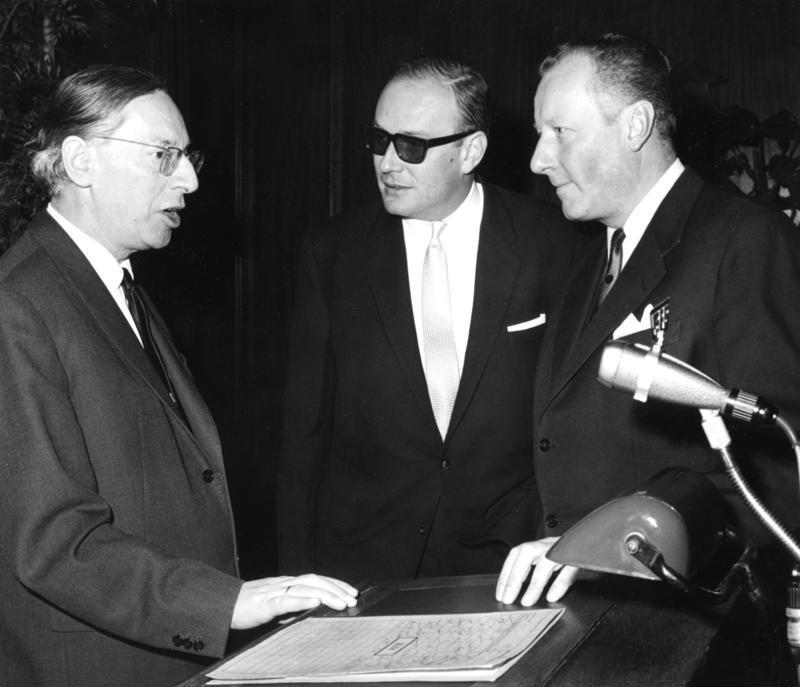 3.1.1964 Bewrlin/West Berliner Kunstpreis für Film und Fernsehen an Neven-DuMont v.l.n.r.: Kultursenator Dr. Adolf Arndt, Filmregisseur Walter Krüttner, Jürgen Neven-DuMont